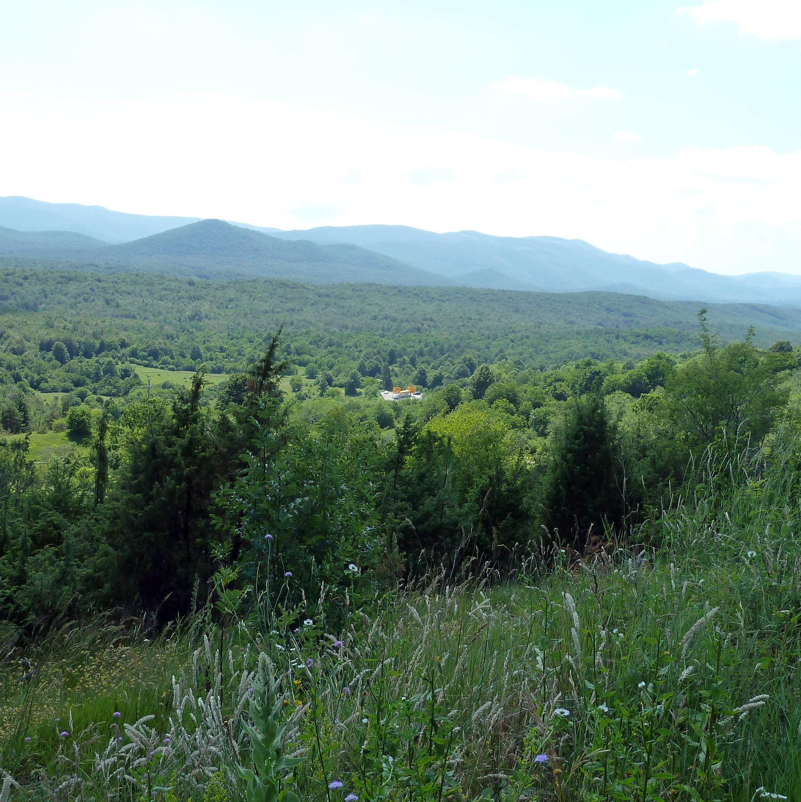 Starod, Ilirska Bistrica, Словения